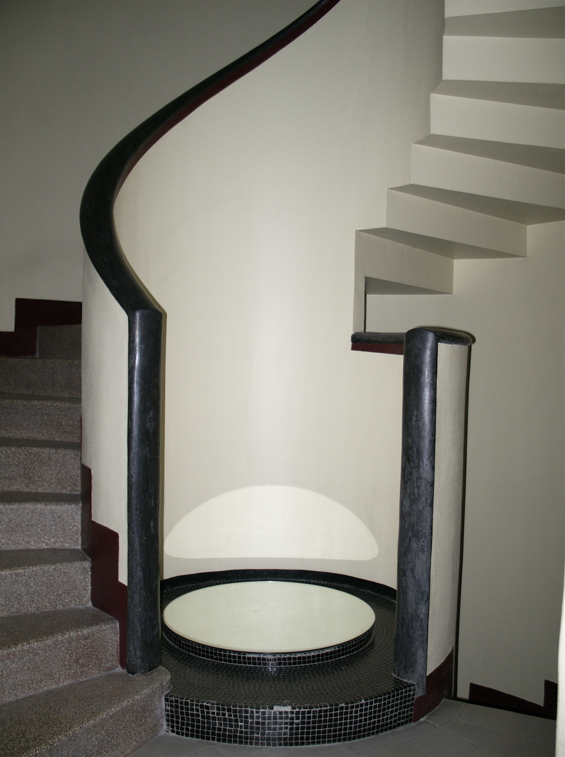 Départ de l'escalier de l'hôtel Martel (10 rue Mallet-Stevens, Paris), par Robert Mallet-Stevens (1927)